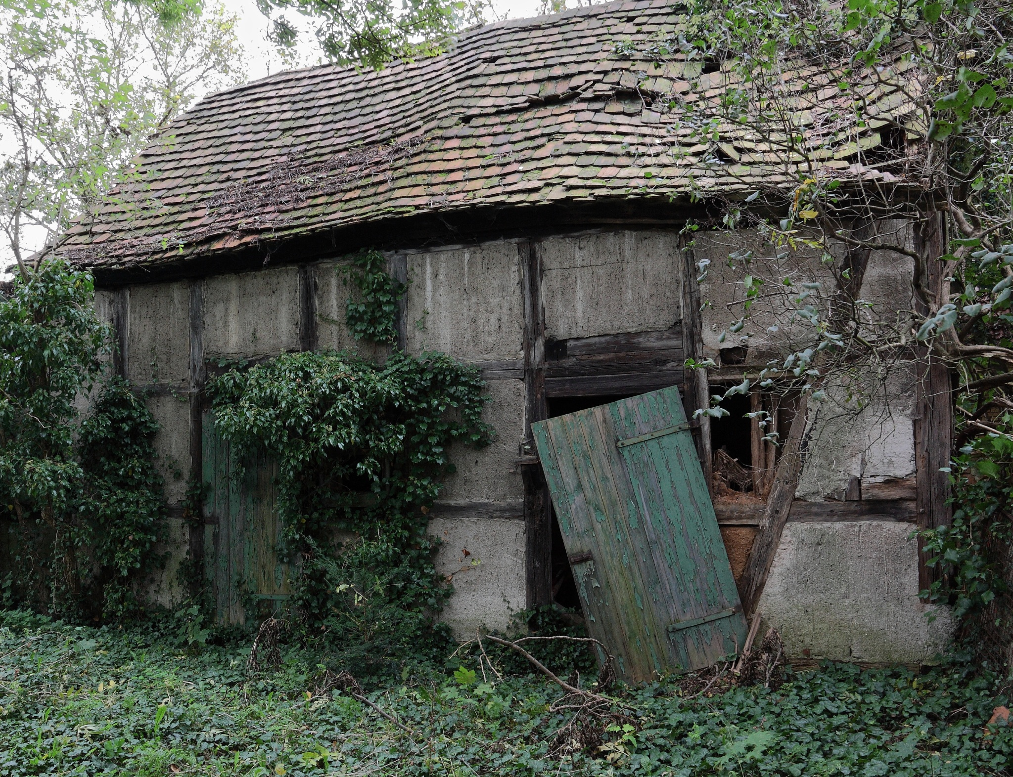 Stallspeicher des Pfarrgehöfts in Stolzenhain.